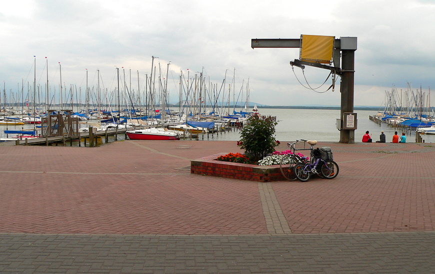 Mardorf Hafen